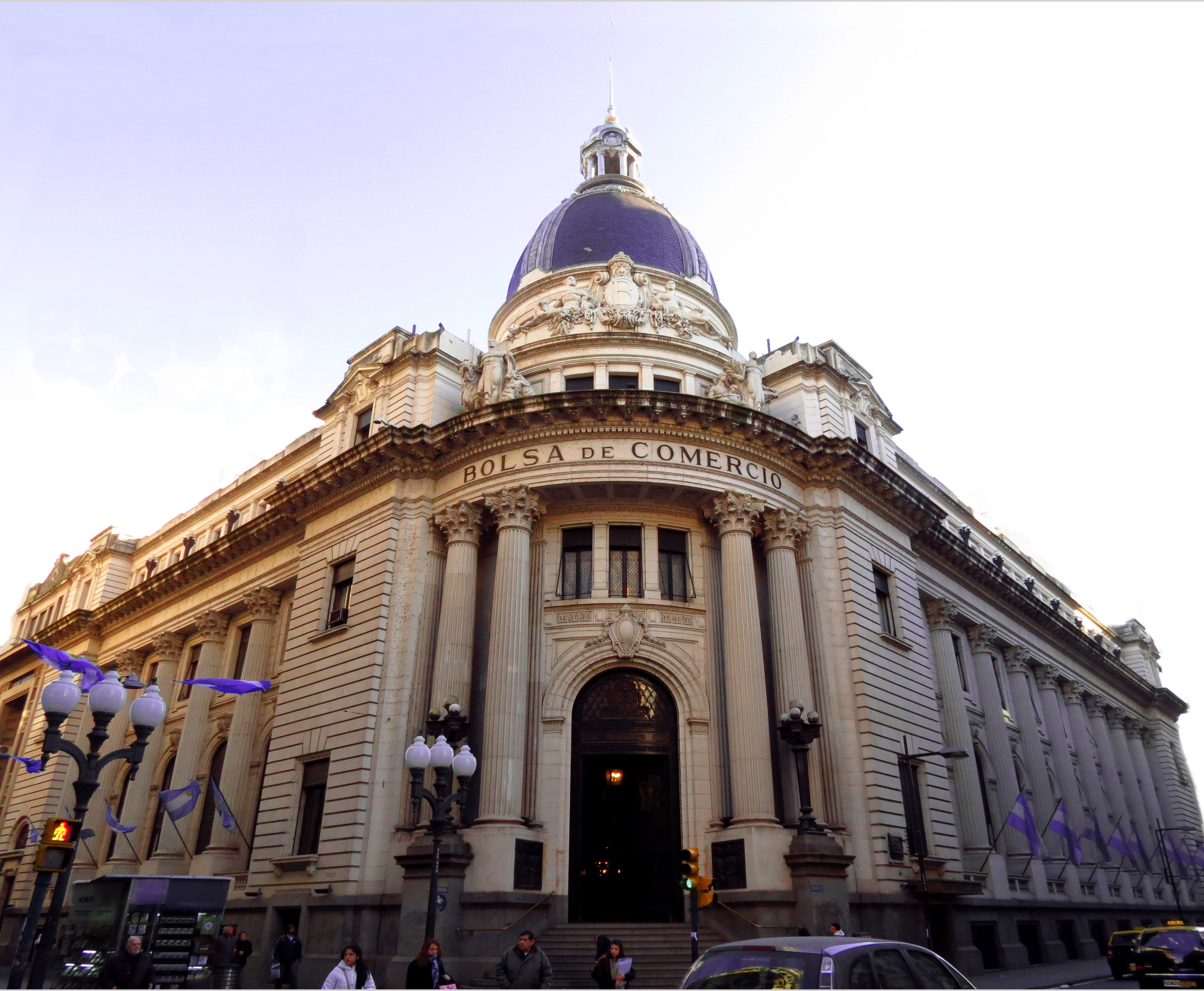 Centro histórico de Rosario